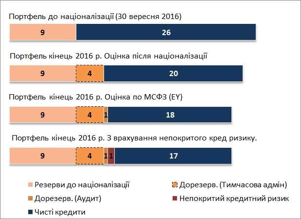 Як змінювалась оцінка портфелю кредитів (фізичних осіб)